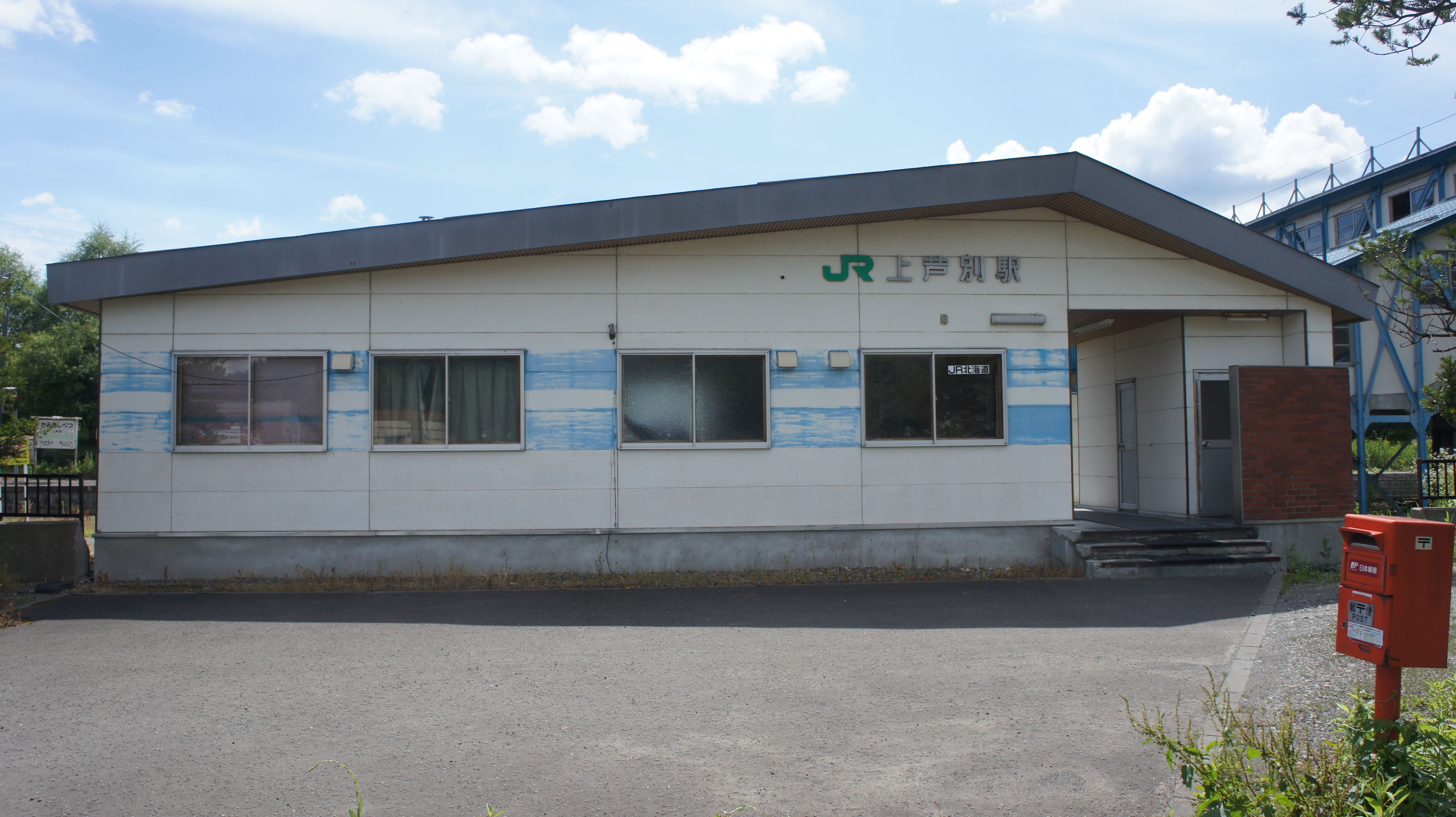 JR根室本線・上芦別駅の駅舎